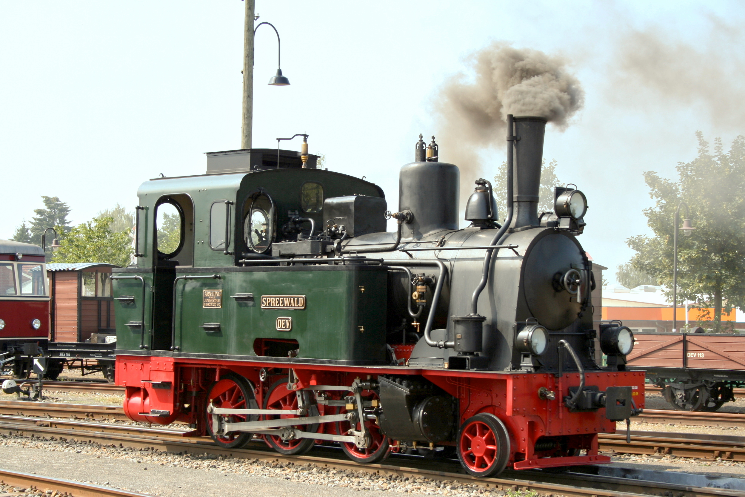 Dampflokomotive 99 5633 als SPREEWALD im Bahnhof Bruchhausen-Vilsen.